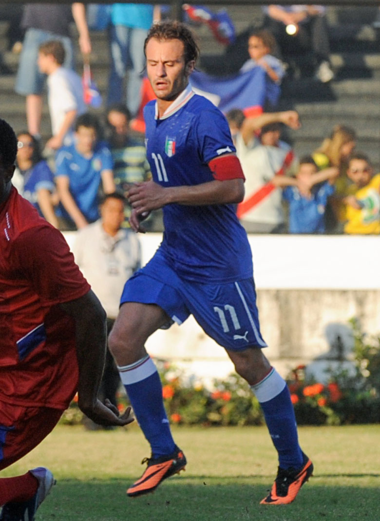 Itália e Haiti fazem amistoso no Estádio São Januário: Alberto Gilardino.